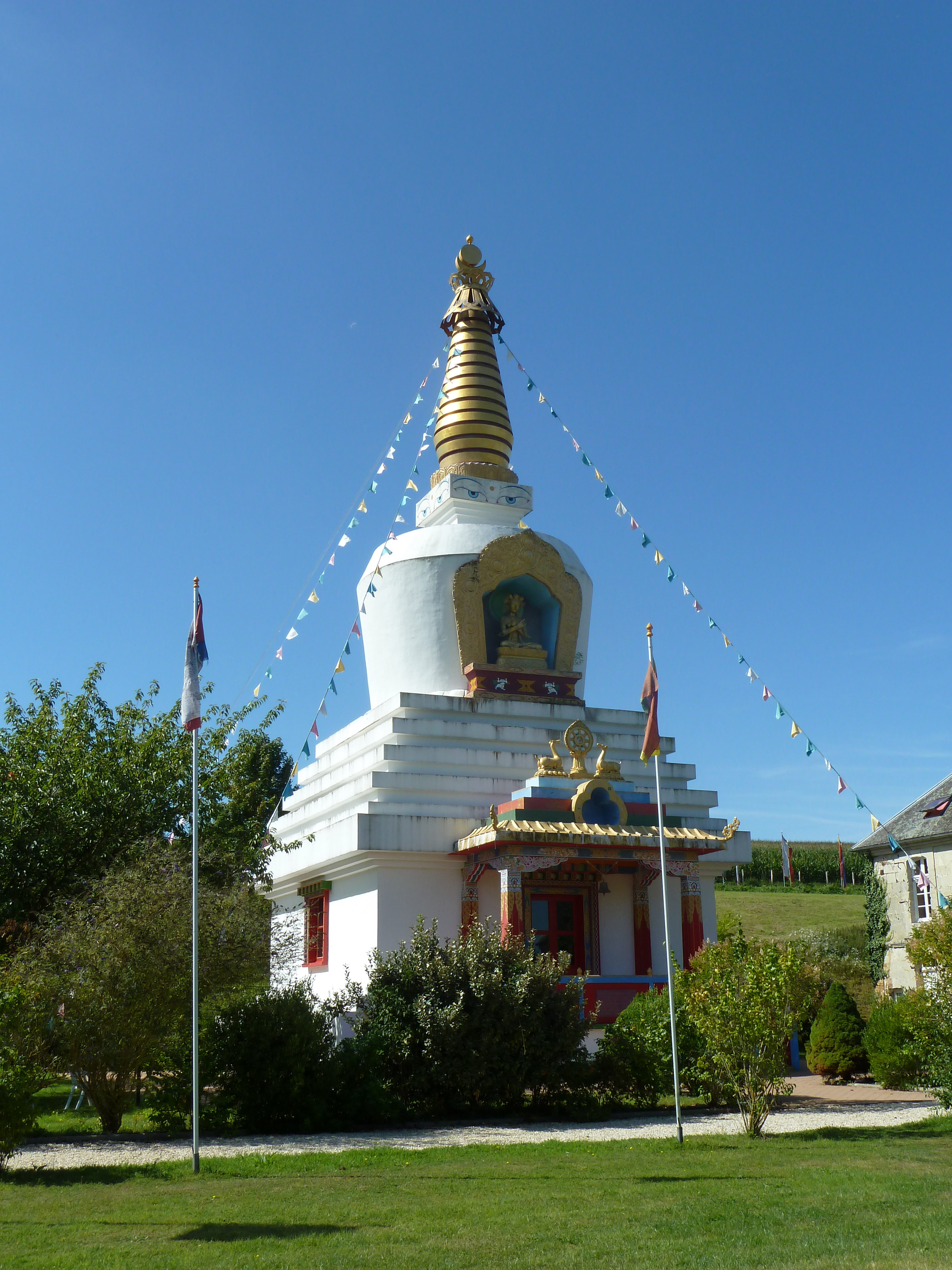 Vajradhara-Ling P1060683 - le stupa